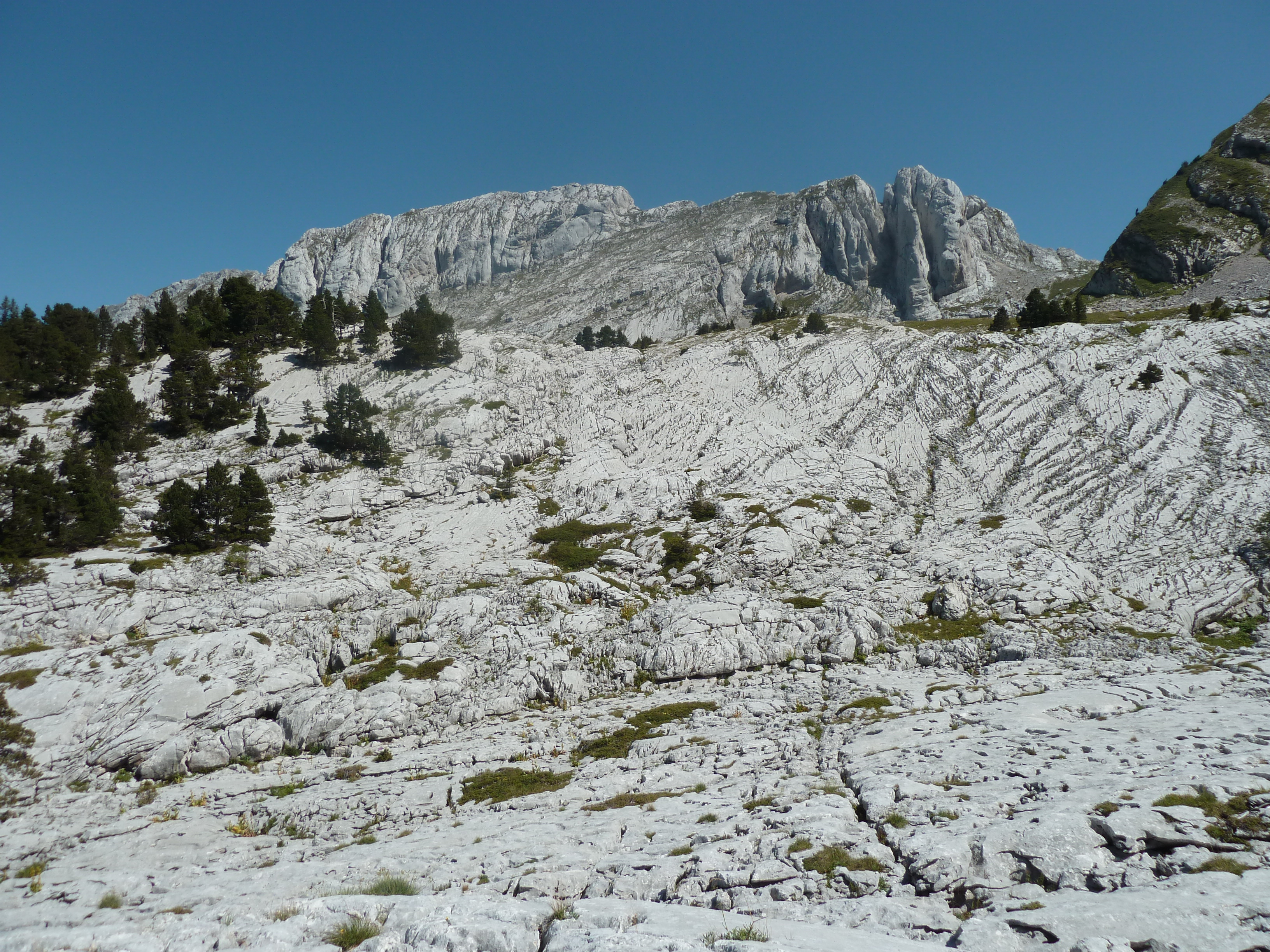 Le Clos d'Aspres dans le massif du Vercors.